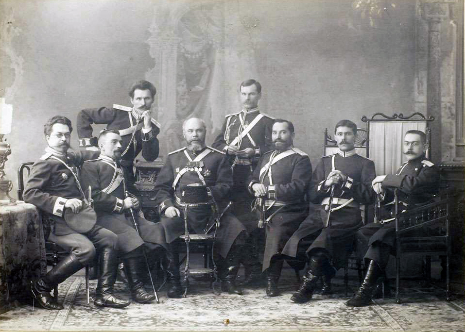 Кременцов Петр Иванович